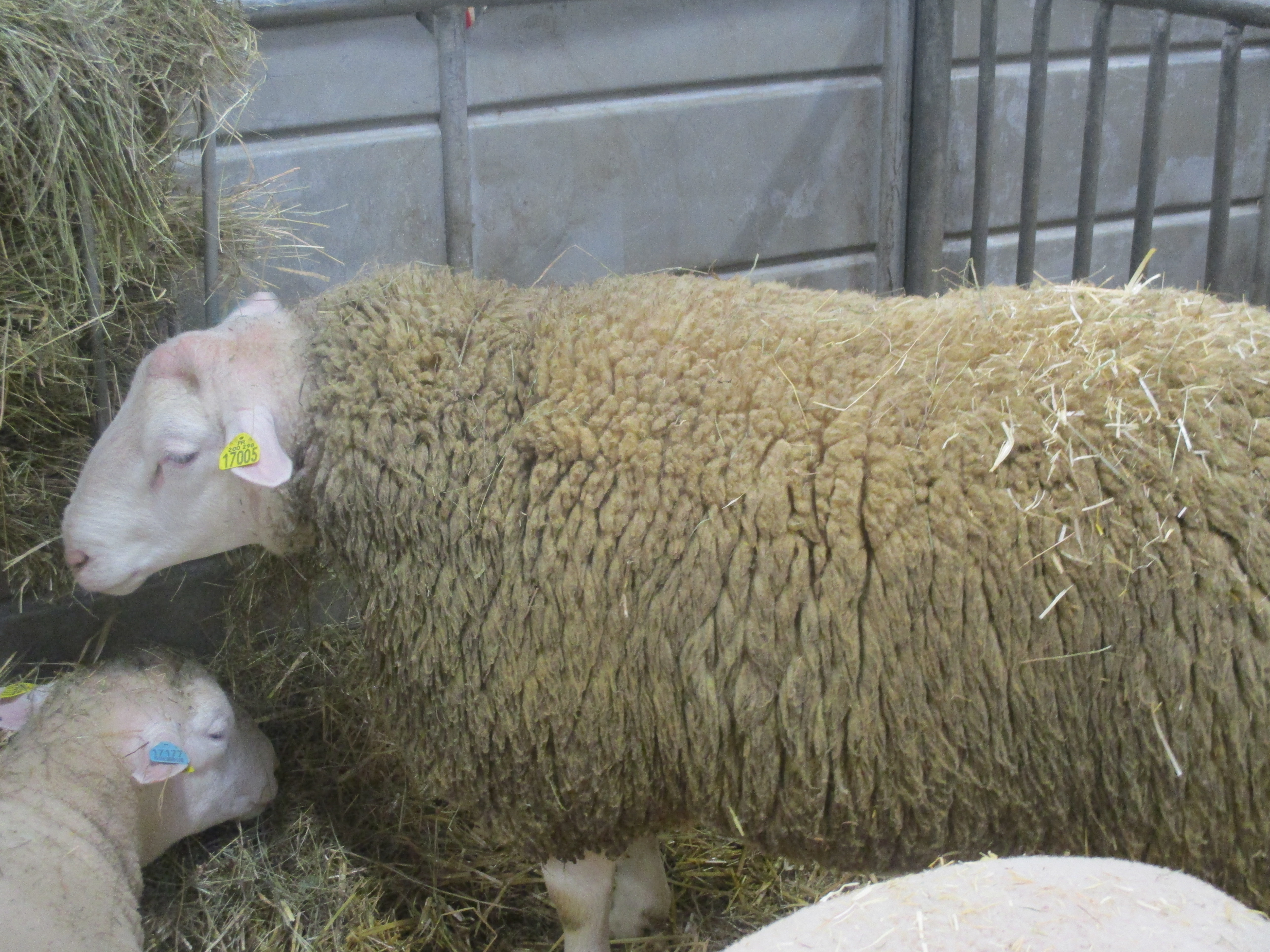 Berrichon du Cher. Brebis.